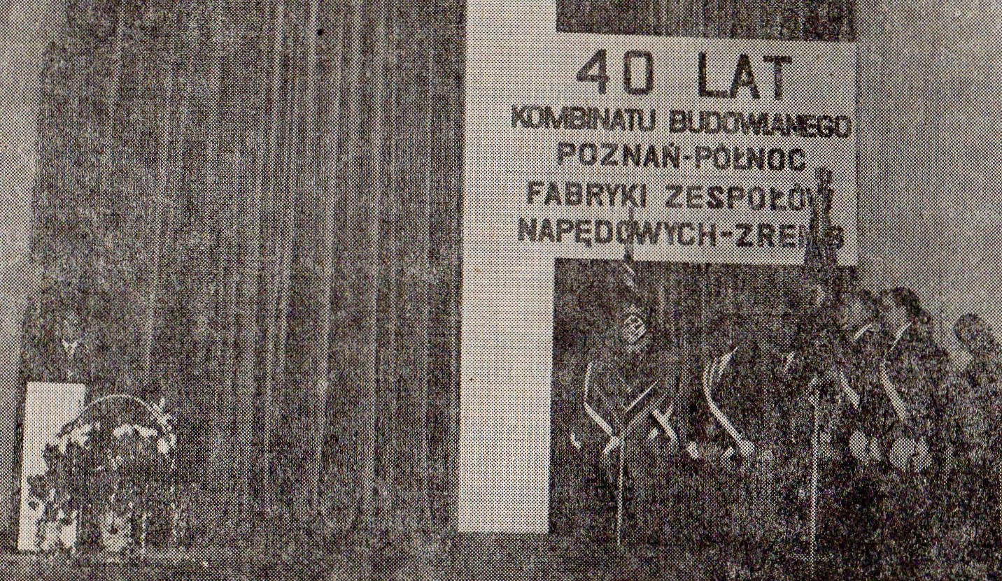 Kombinat Budowlany Poznań-Północ. 40-lecie (1987r.).